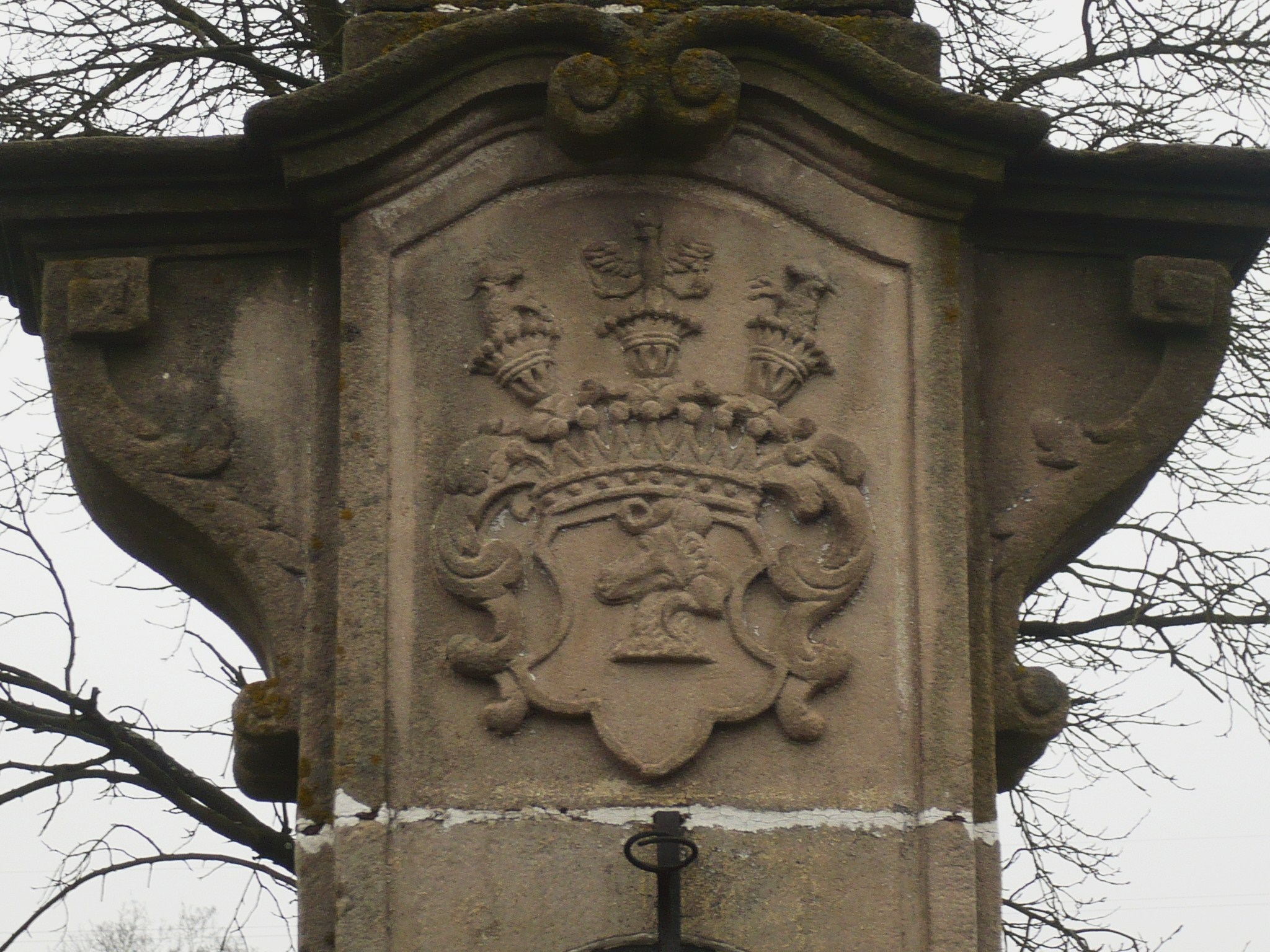 Suszyna. Herb pod Krzyżem